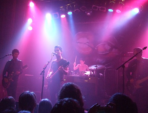 Stereophonics, im Knust (Hamburg)